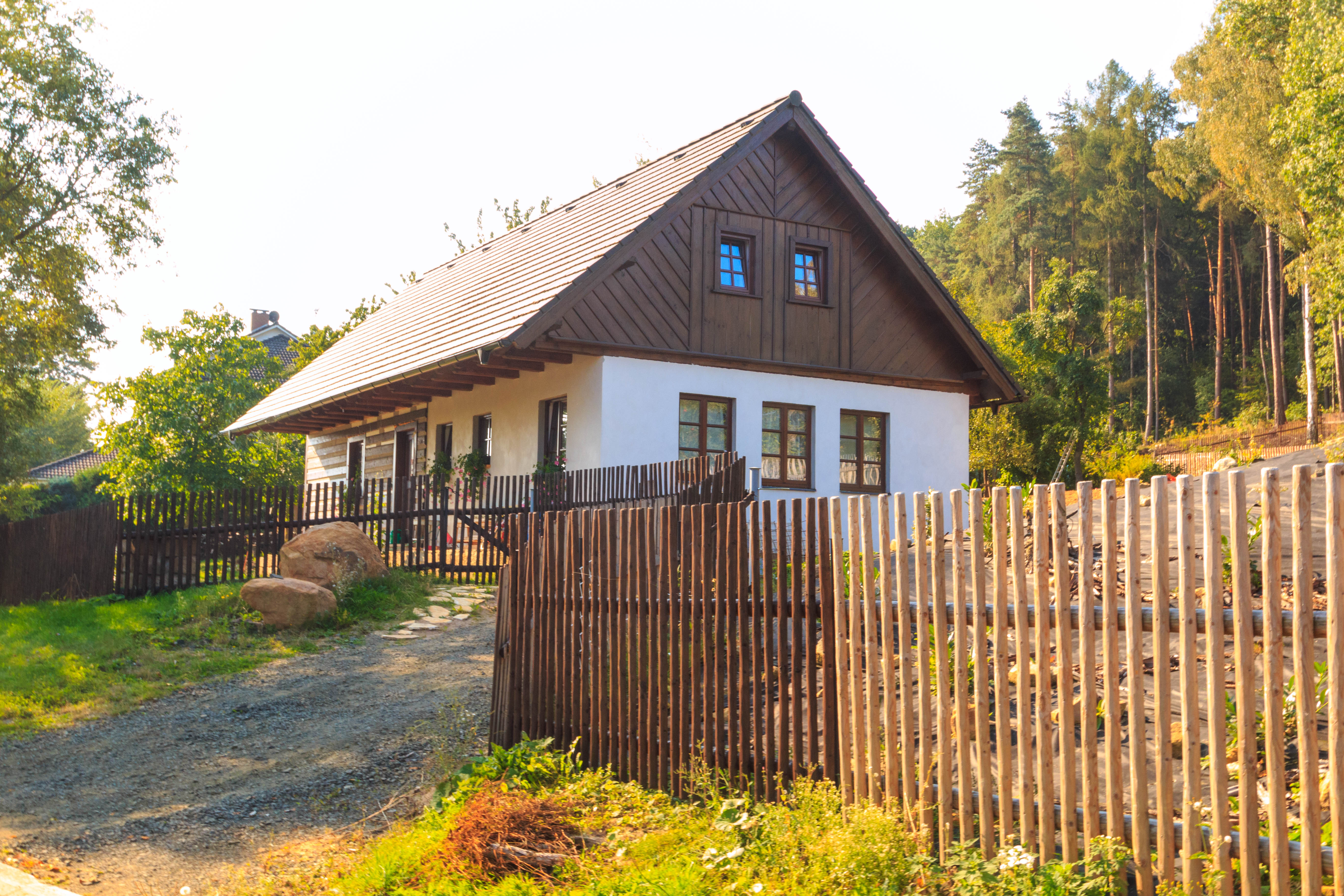 Horní Podůlší - čp. 94